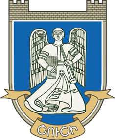 Coat of arms of Shushi